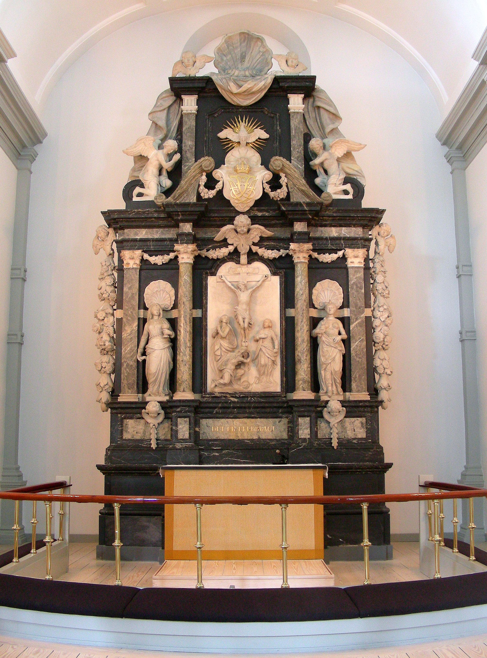 Garnisons Kirke (Garrison Church), Copenhagen, Denmark. Altar. By Didrick Gercken and Just Wiedewelt.